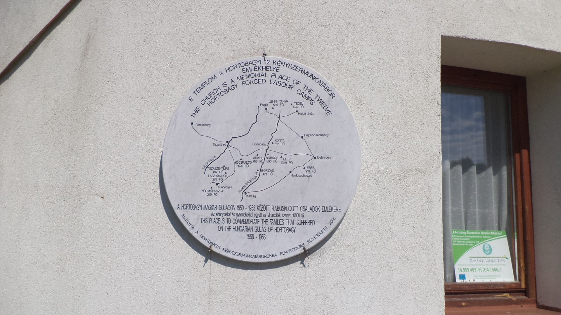 Jó Pásztor ökumenikus templom falán kényszermunkatábor emléktáblája, Hortobágy